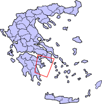 Острова Саронического залива на карте Греции